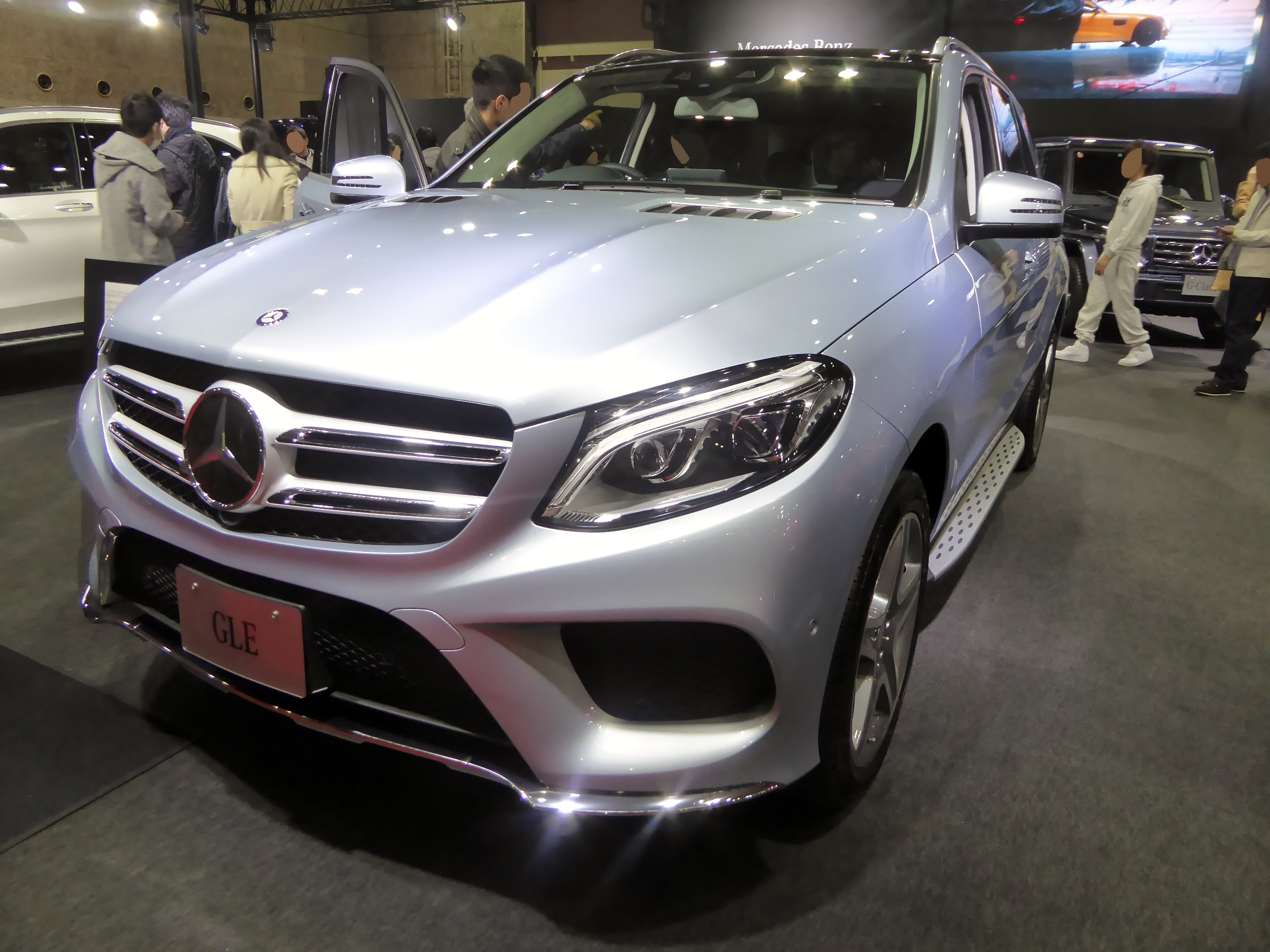 大阪モーターショー2015においてW166型メルセデス・ベンツ・GLE350d 4マティックスポーツを撮影。